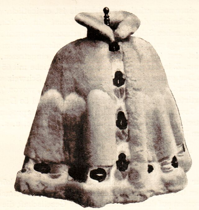 Cormorant skin pelerine, Norway / Pelerine aus Kormoranfell. Pelerine aus Cormoranfellen: Die bunten Hälse sind als Besatz verwendet. Model der Firma Brandt in Bergen, Norw.